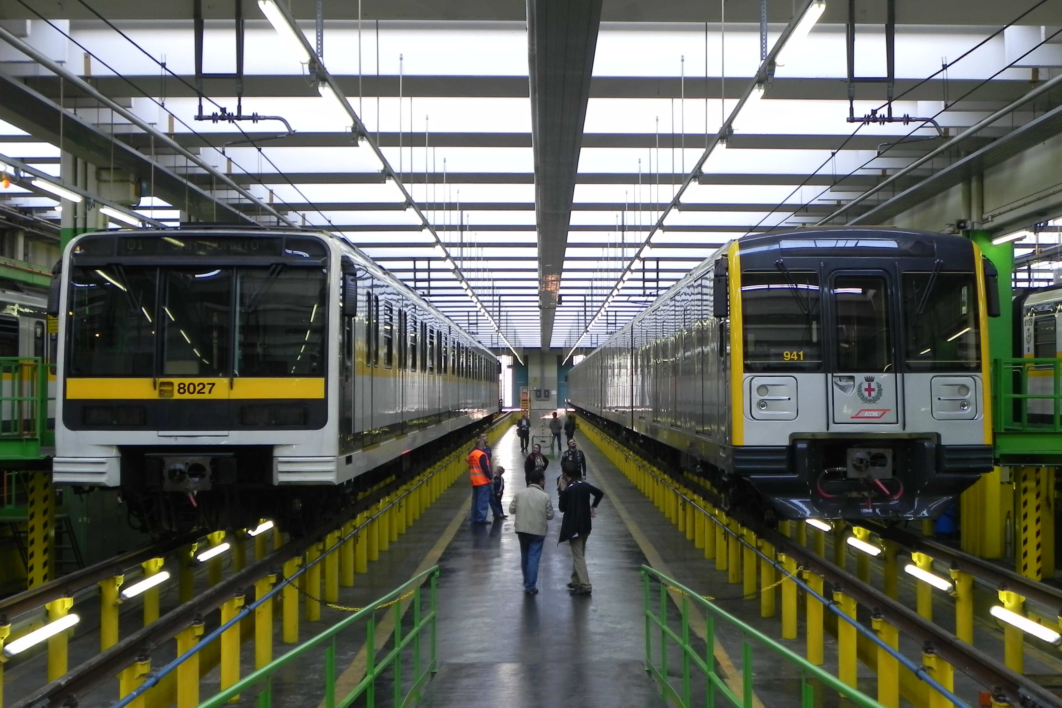 Milano, Deposito Rogoredo